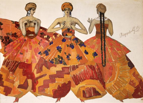 Федор Федоровский. Эскиз костюмов персидских рабынь-танцовщиц к опере "Хованщина". 1912